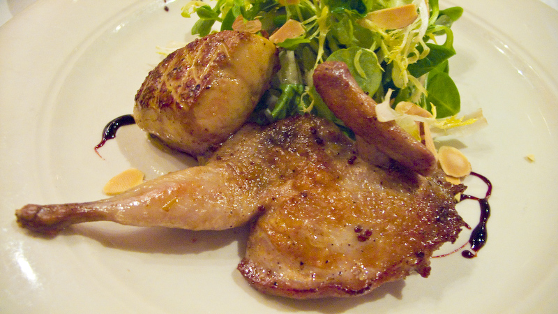 Squab (young pigeon)